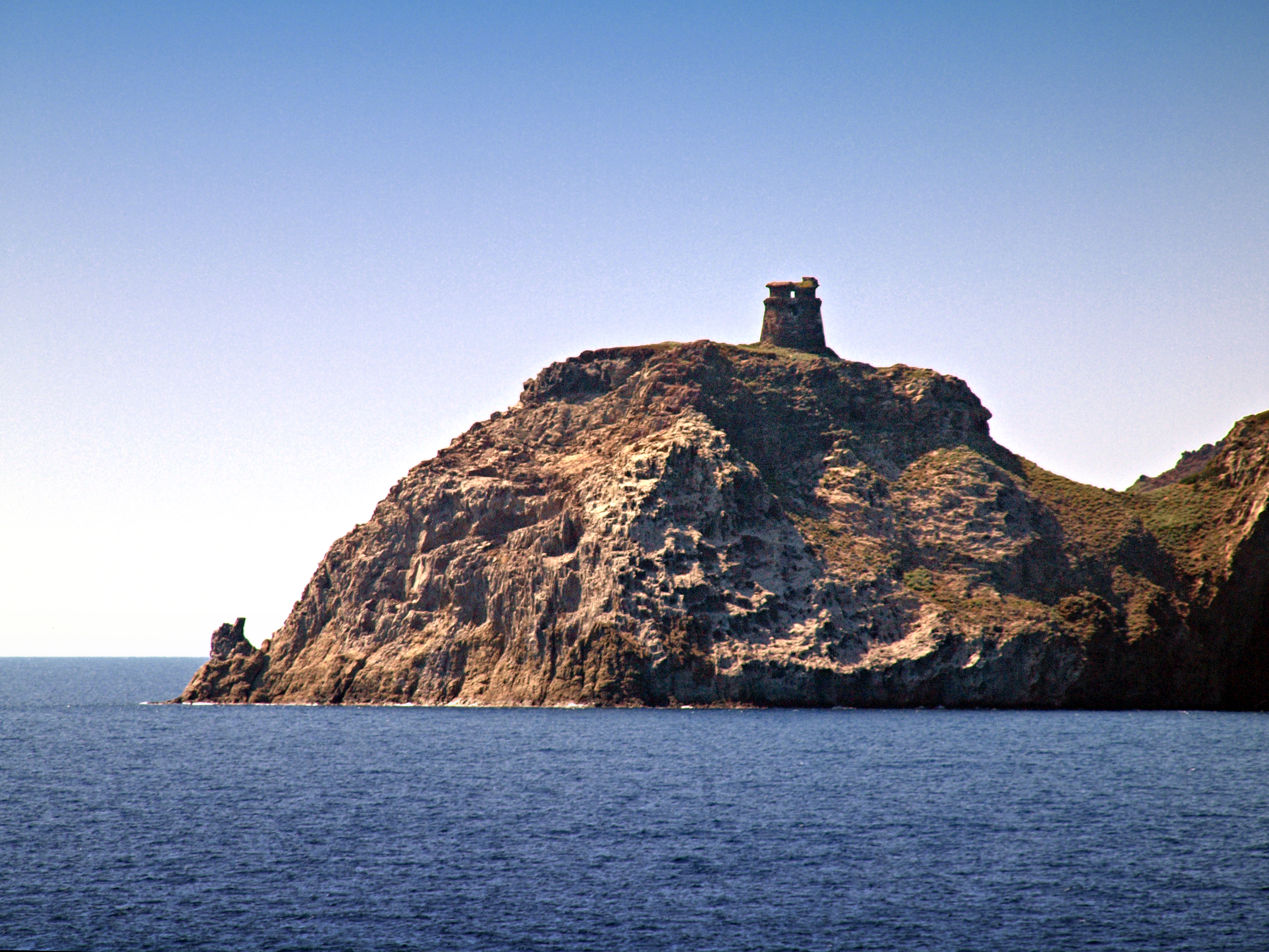 Île de Capraia (Livourne), Toscane (Italie) - Tour de la pointe de l'extrême sud de l'île